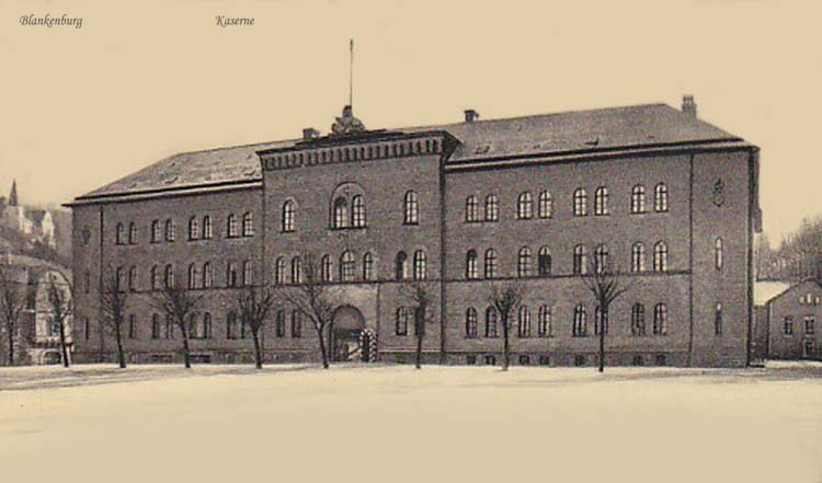 Infanteriekaserne in Blankenburg